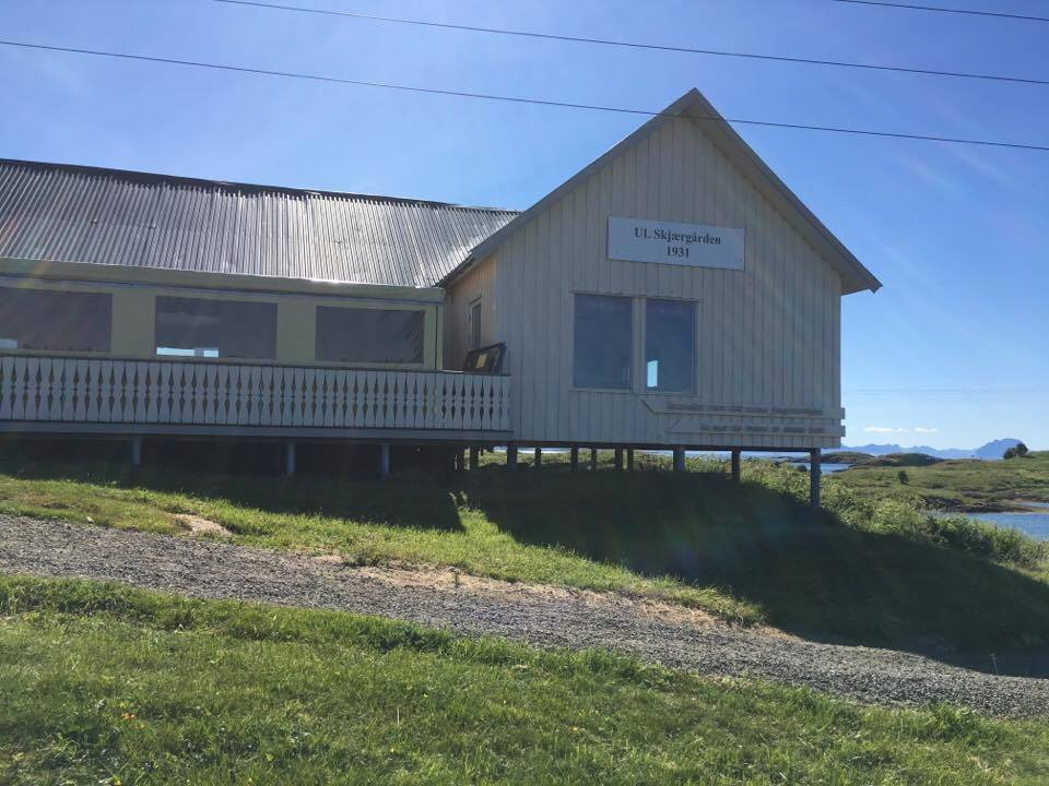 Ungdomshuset til UL Skjærgården på Sørvær, Fleinvær i Gildeskål kommune, Nordland.